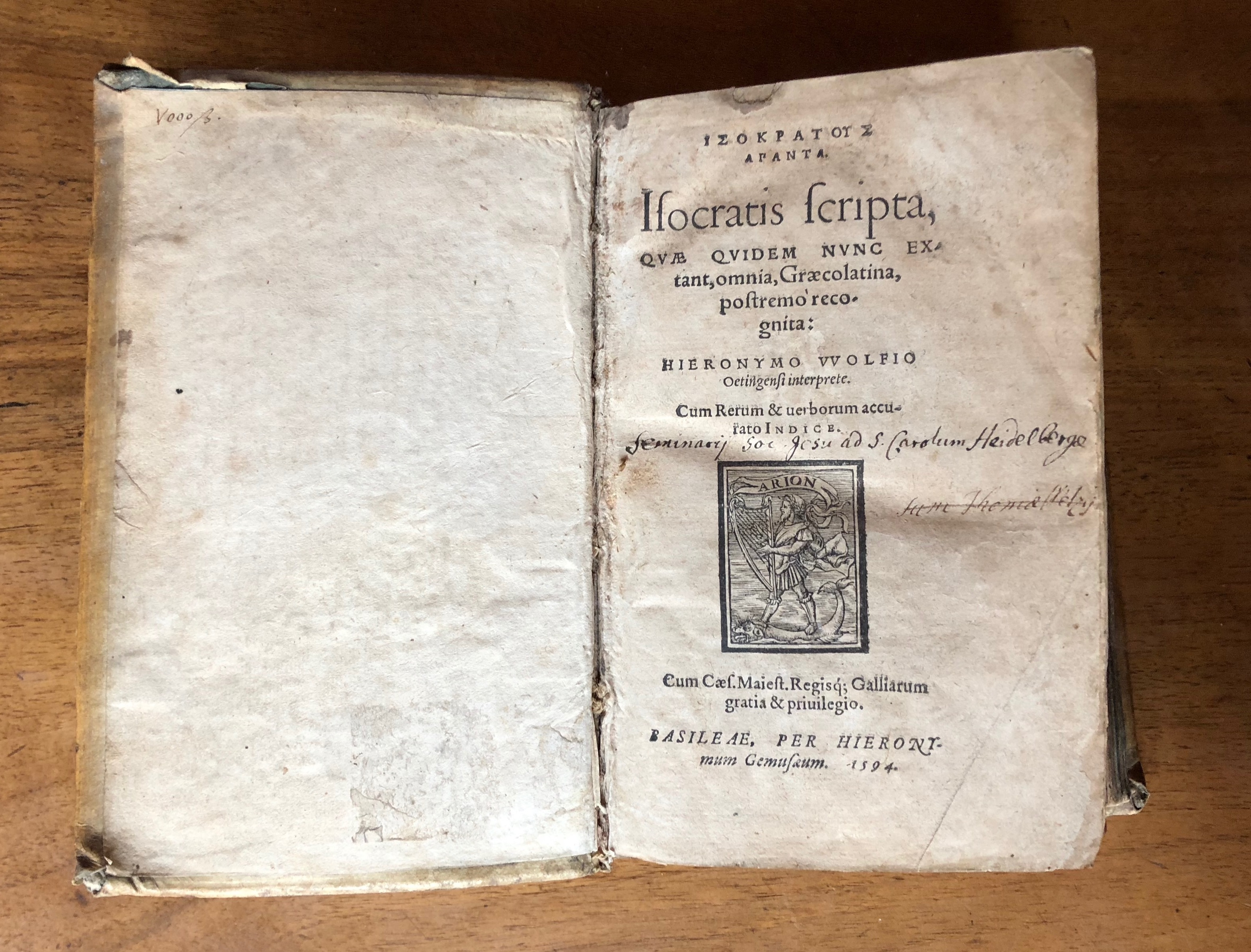 Hieronymus Wolf: „Isocratis Scripta, quae quidem nunc extant, omnia, Graecolatina, postremo recognita“ Basel 1594